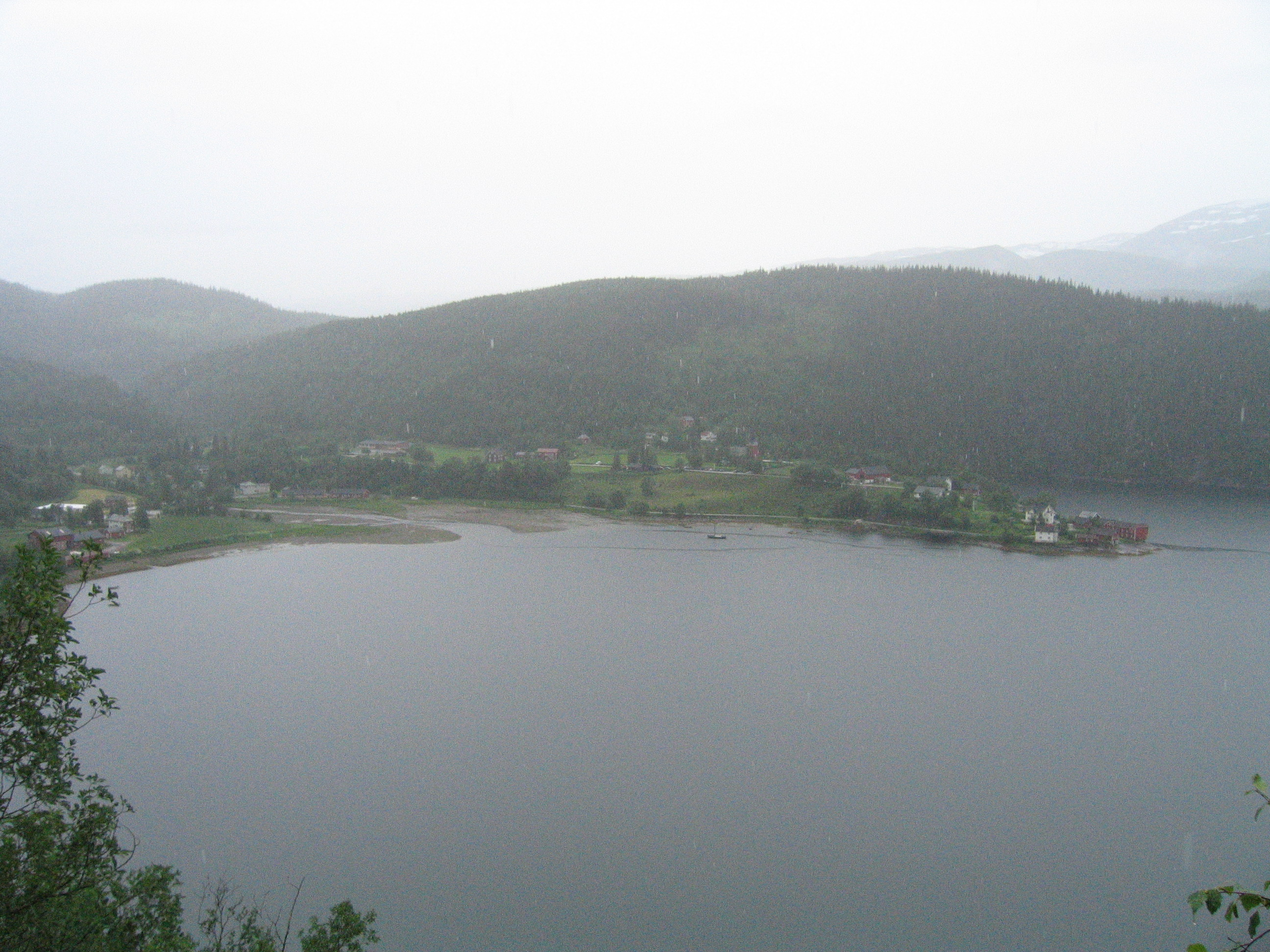 Elsfjord, Nordland, Norway. Picture taken by user:ZorroIII.